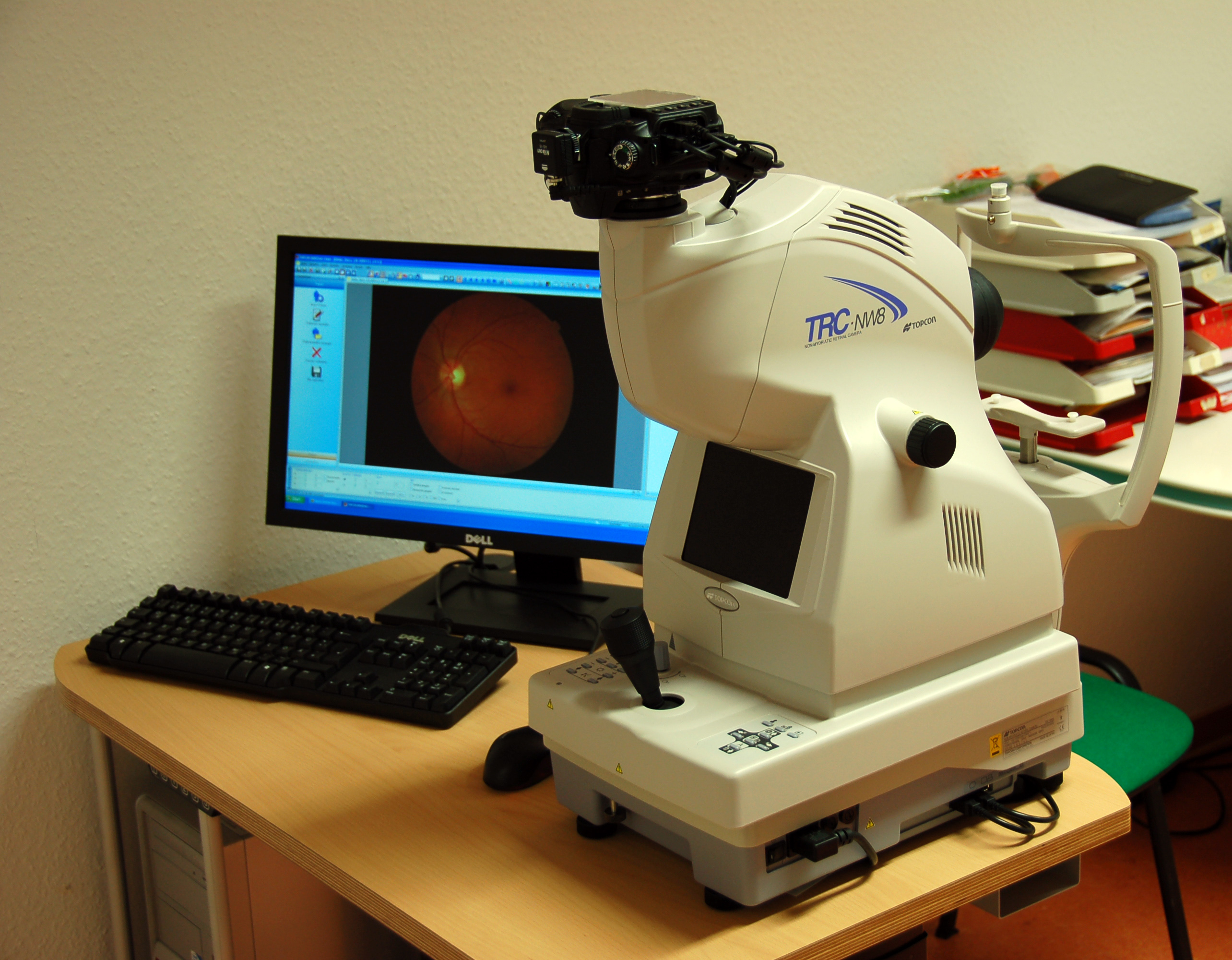 Funduskamera in einer Augenarztpraxis